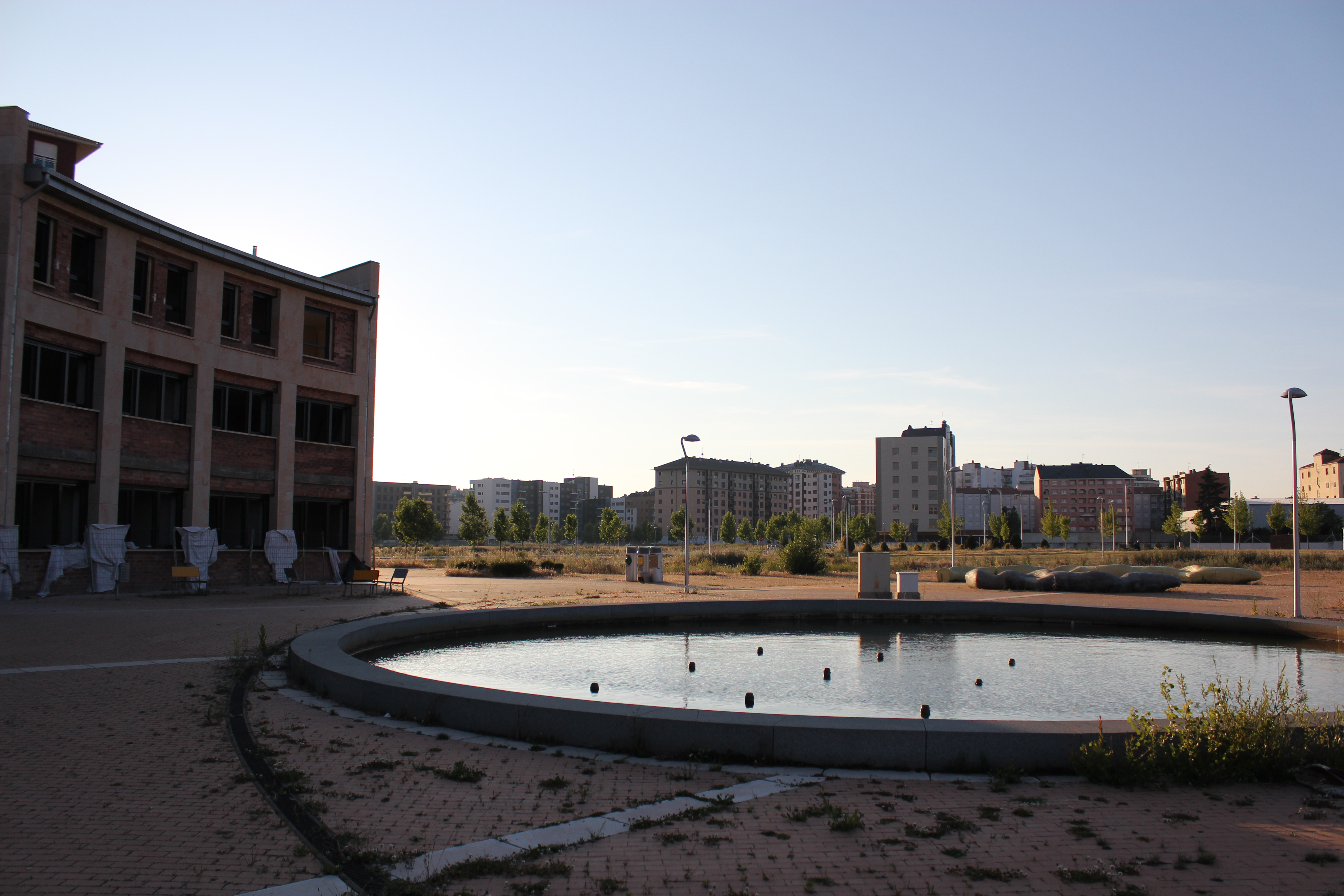 La Lastra, León